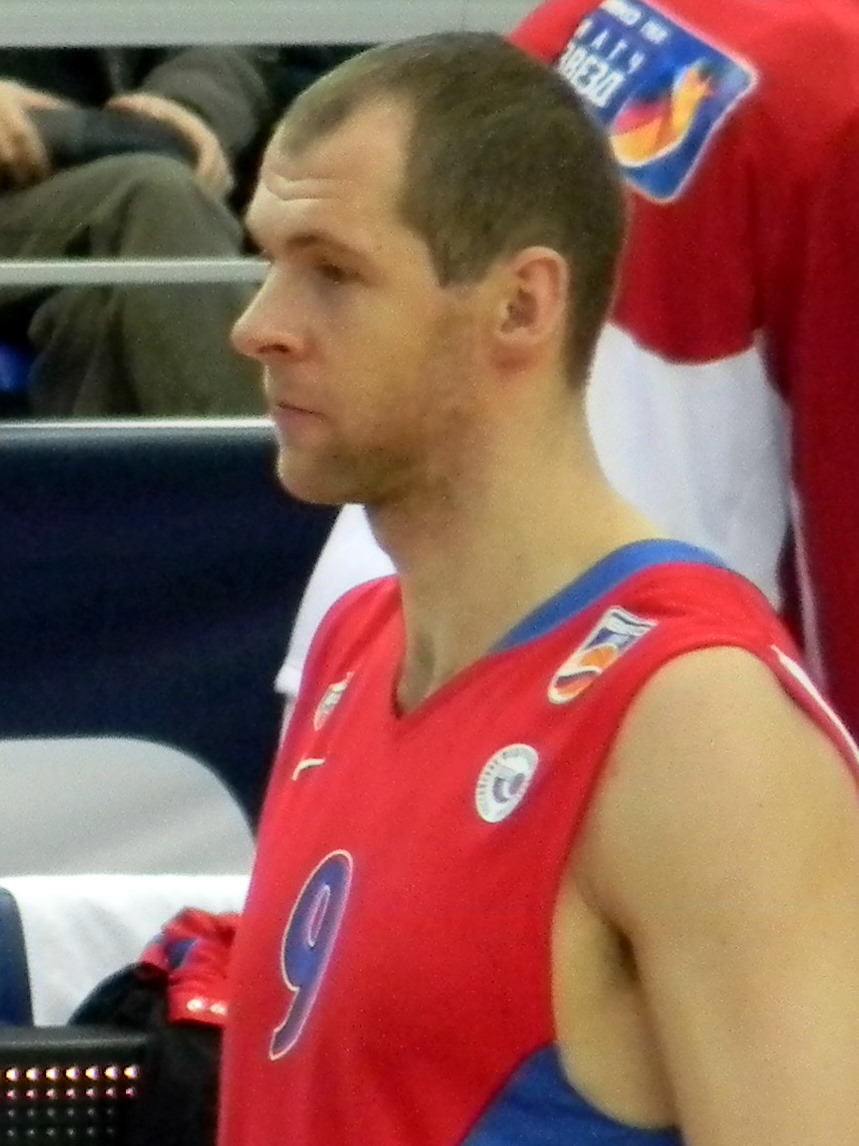 Ramūnas Šiškauskas, lithuanian Basketball player, at all-star PBL game 2011